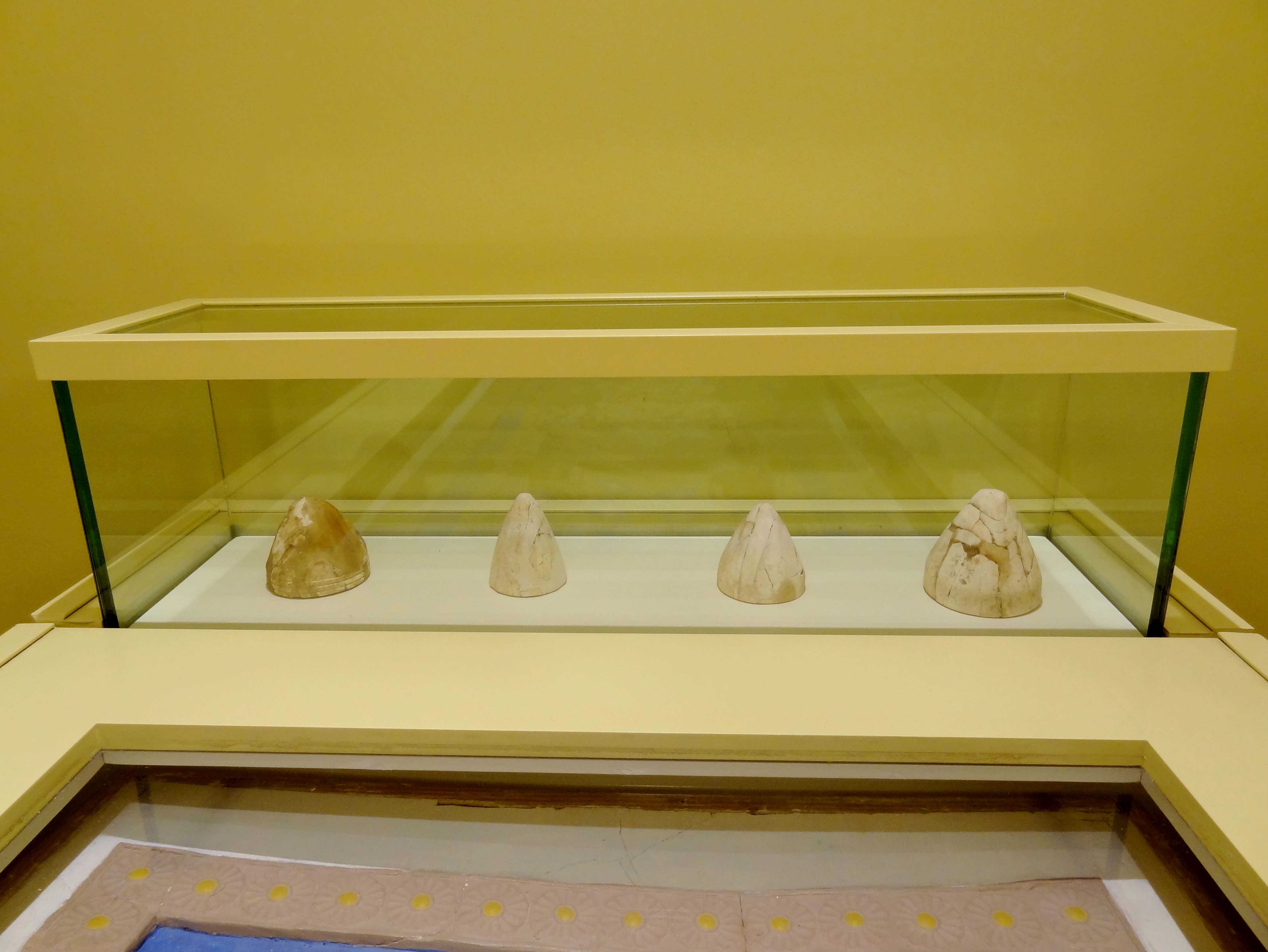 Minoische Spielsteine aus Elfenbein (Neupalastzeit, 1600–1500 v. Chr.) aus Knossos, ausgestellt im Archäologischen Museum Iraklio, Kreta, Griechenland